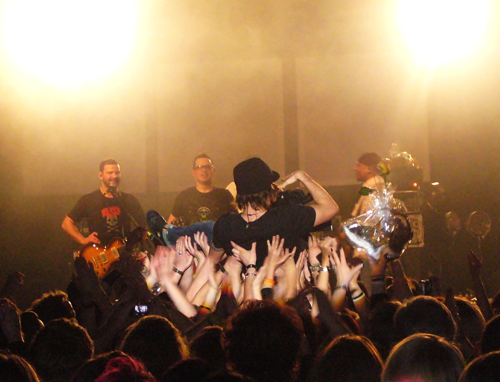 Stagediving Plan A-Tour 2009